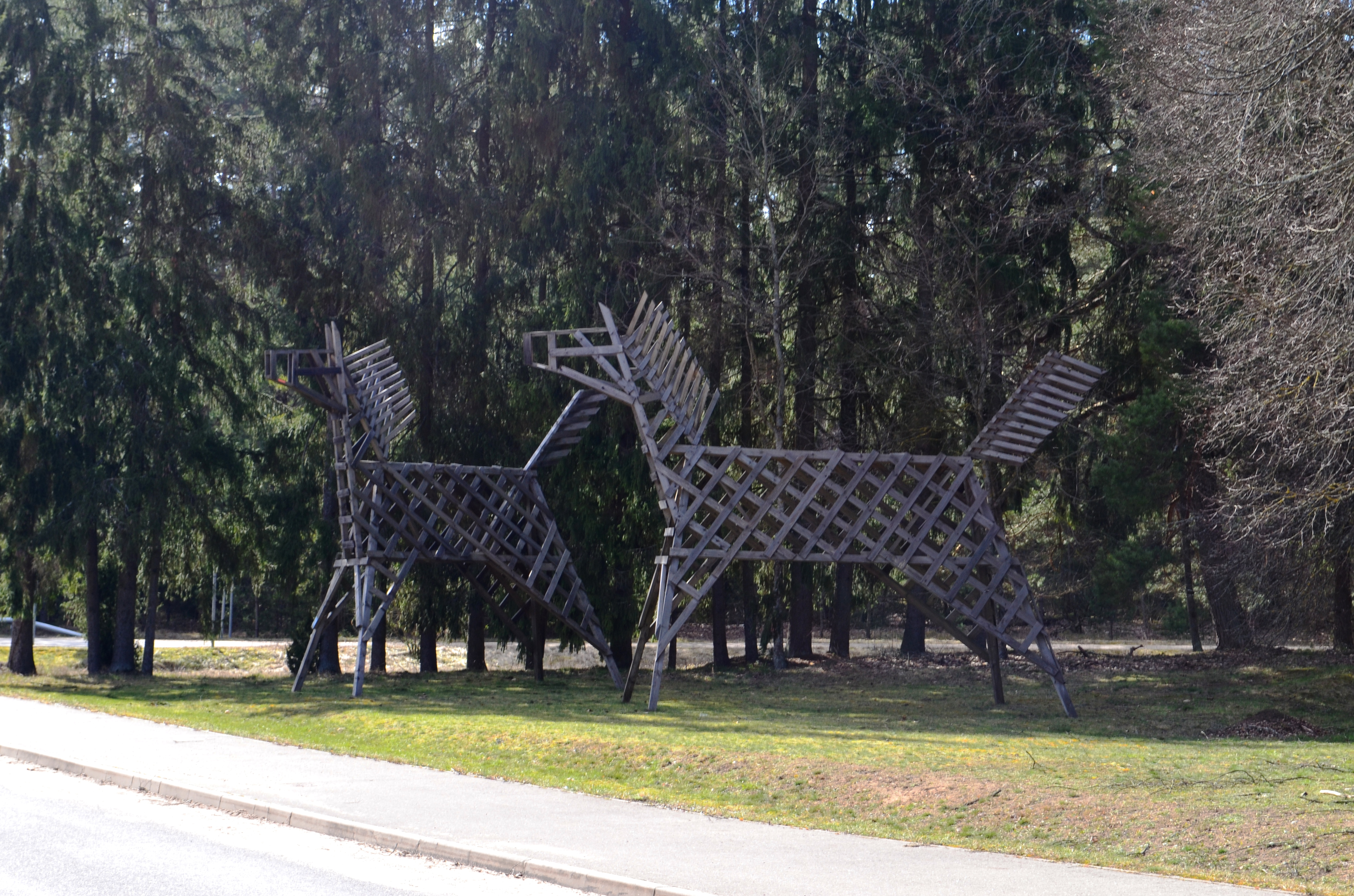 Mediniai žirgai prie Arklio muziejaus, Niūronys, Anykščių raj.